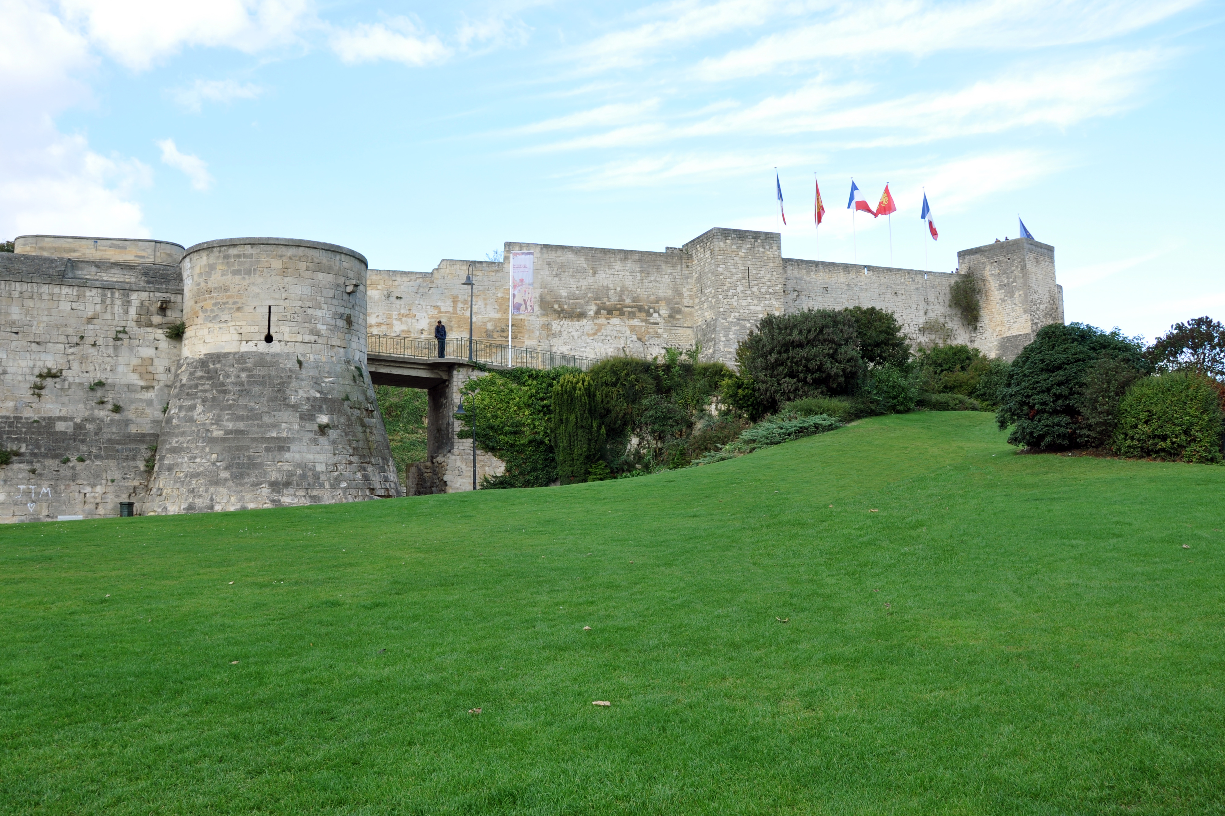 Le château de Caen.